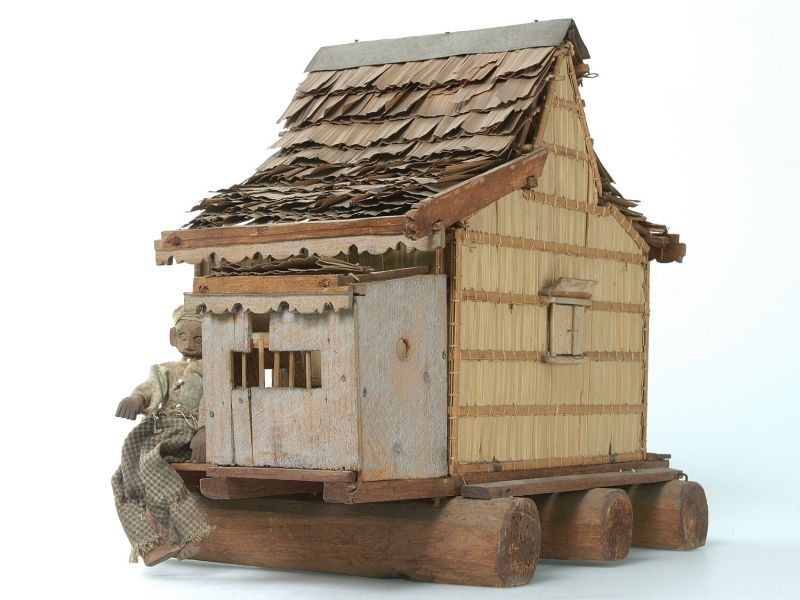 Huismodel. Model van een vlotwoning